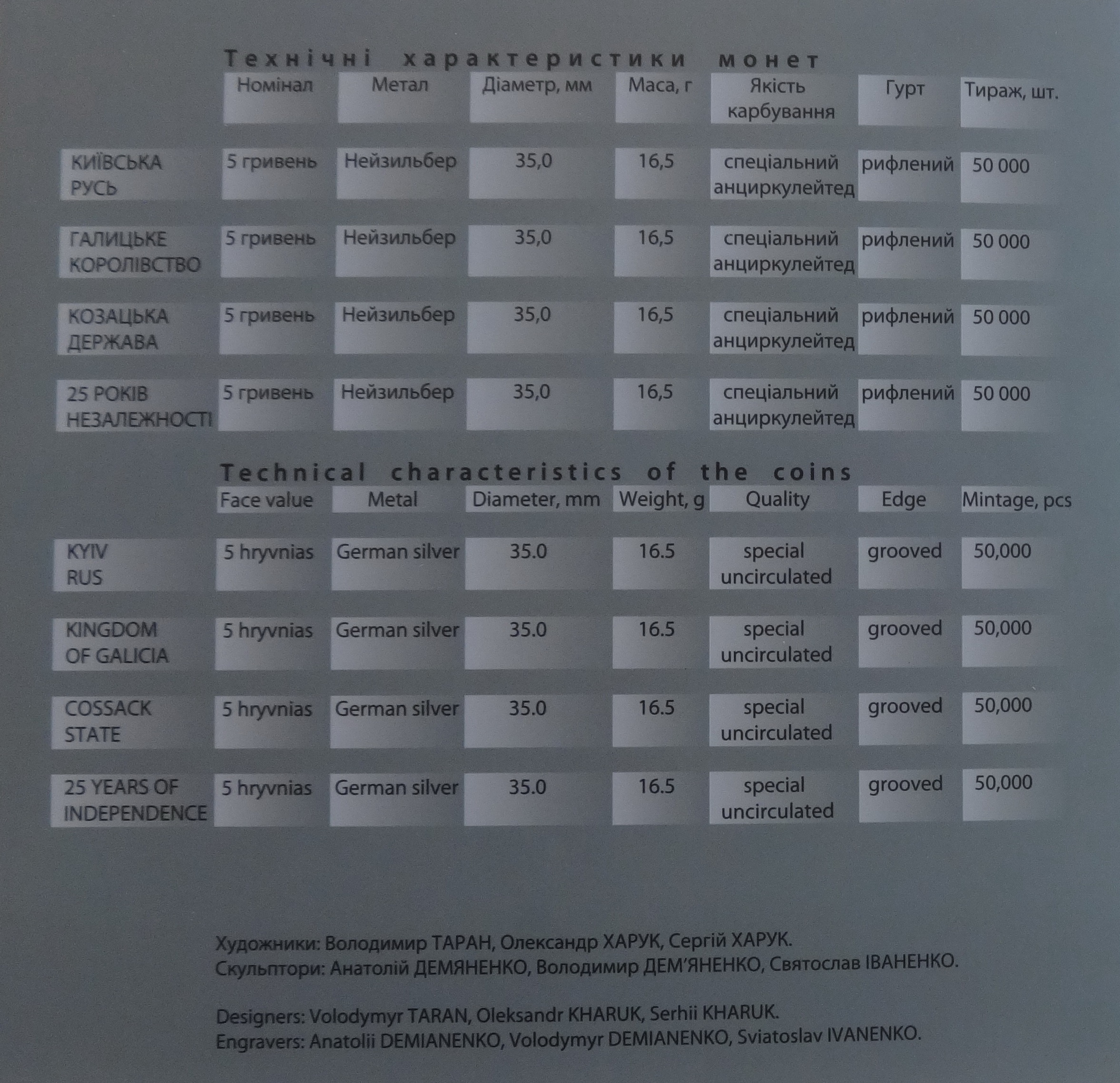 Набір монет НБУ «25 років незалежності України». Обкладинка.